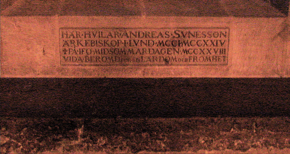 Mindesten over ærkebiskop Anders Sunesens grav i Lund Domkirke, Skåne, Sverige